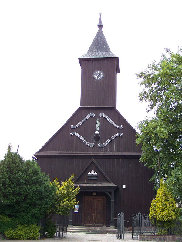 Polska, woj. wielkopolskie, powiat pleszewski, gmina Dobrzyca, Dobrzyca, Kościół parafialny pw. św. Tekli